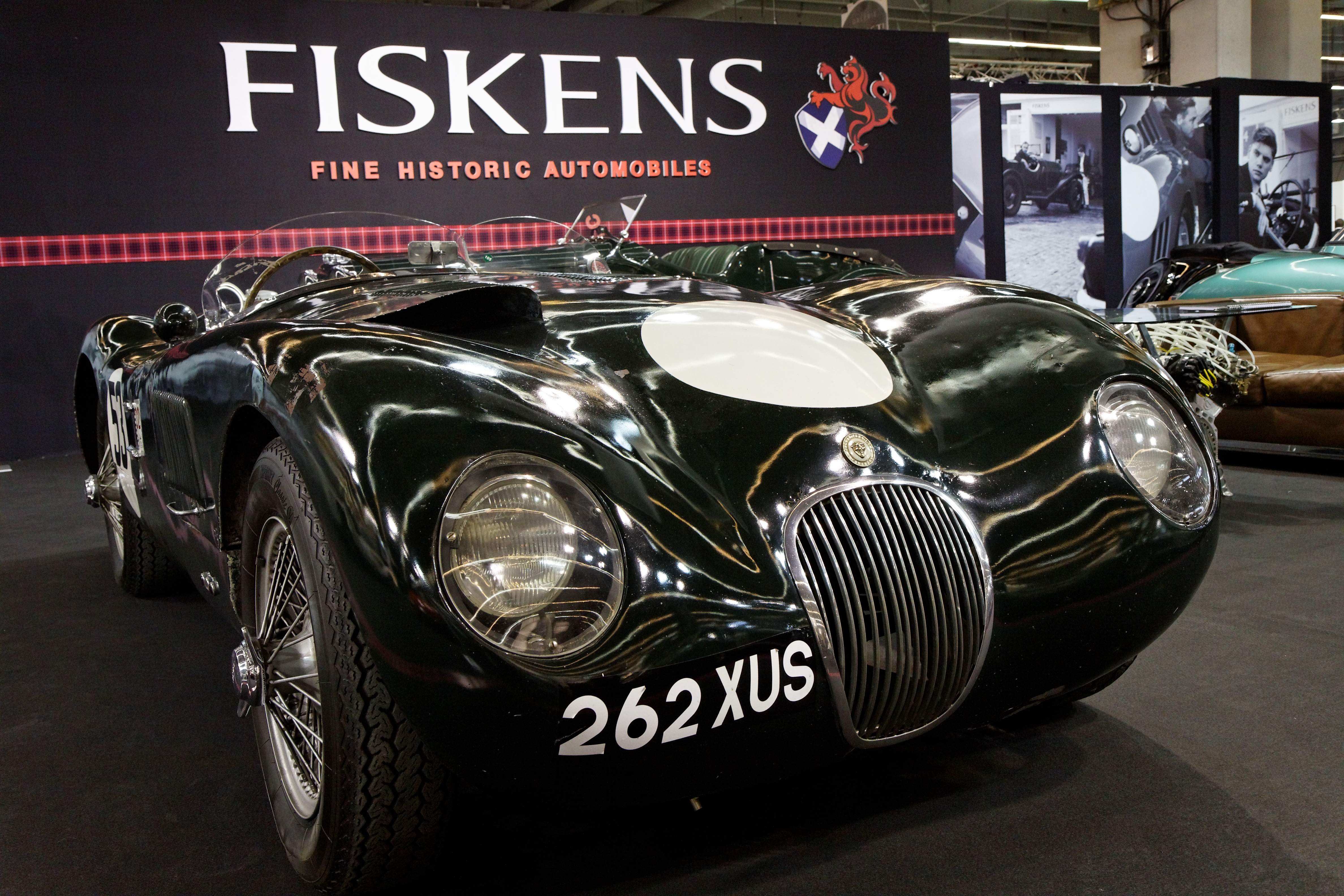 Photographie prise lors du salon rétromobile 2011 à Paris, porte de Versailles.